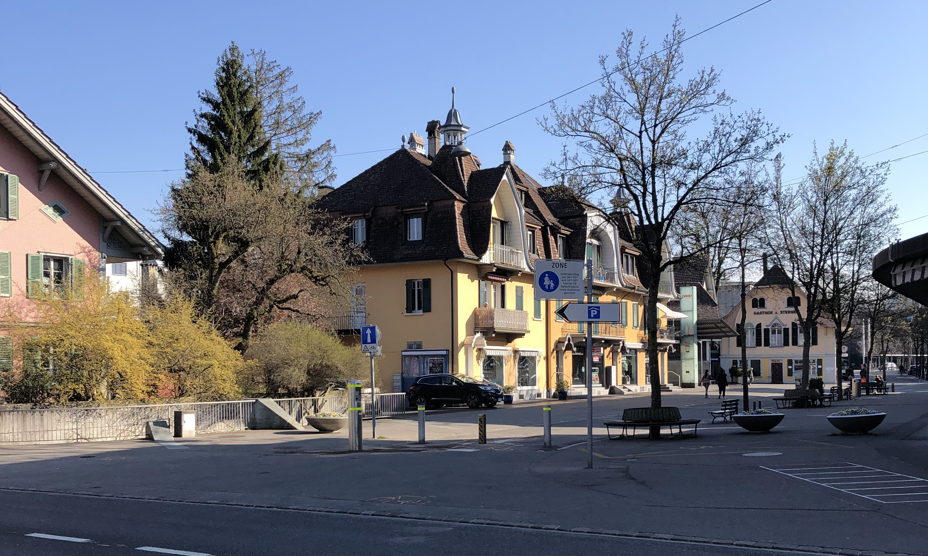 Bümpliz Dorf Bebauung Fussgängerzone